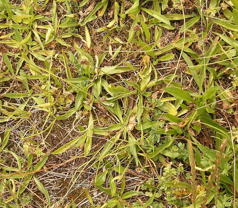 Plantago lanceolata